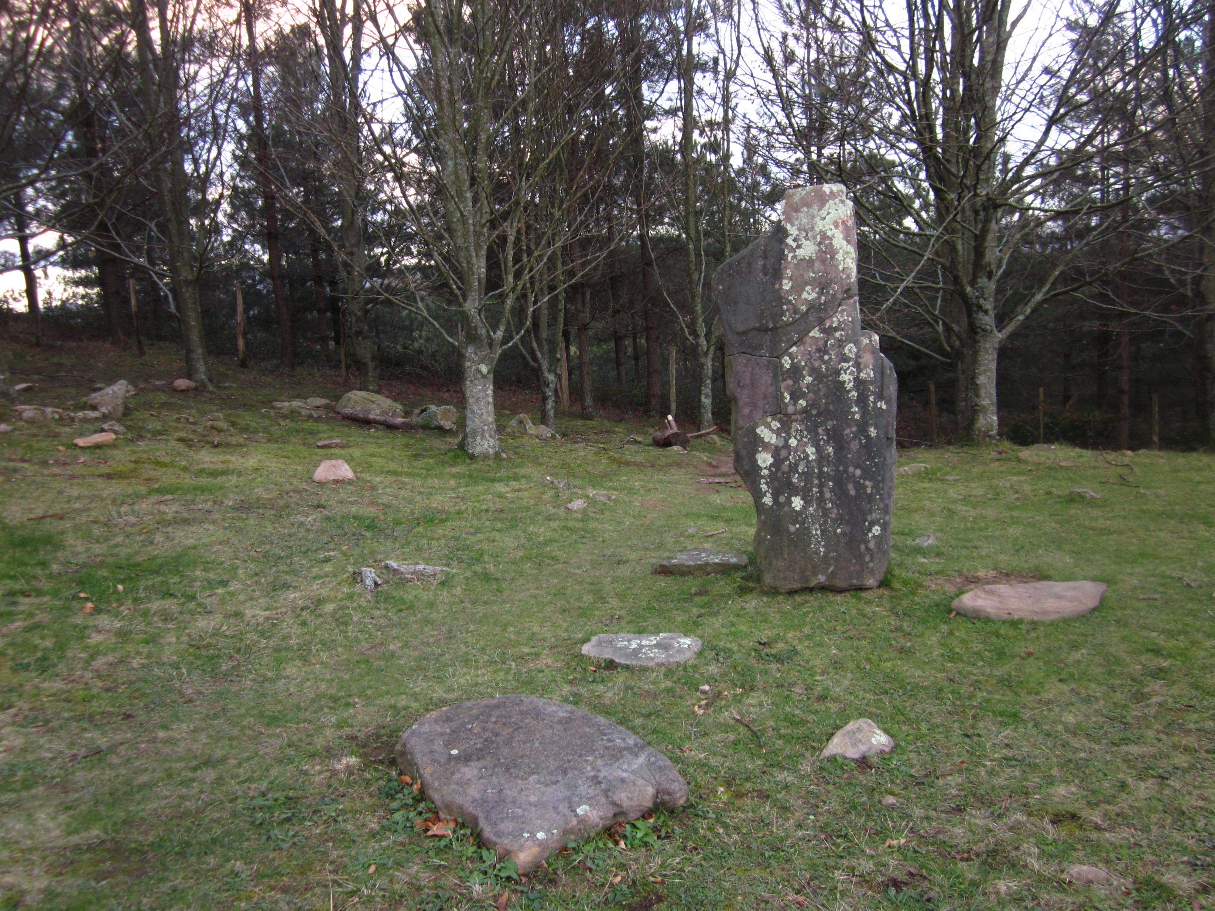 Monolithe de Mulisko Gaina